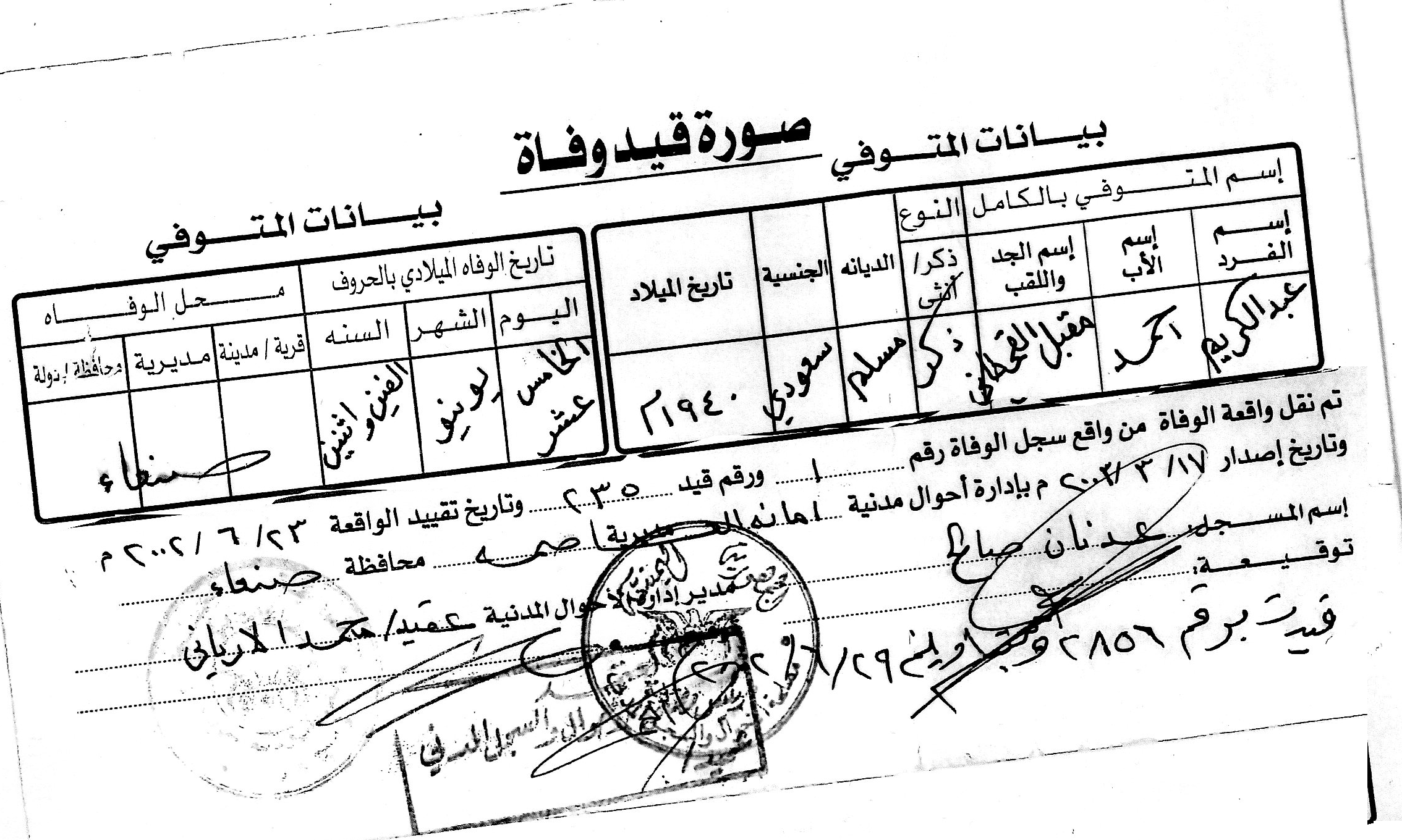 كان في زيارة عمل قادم من العراق الي اليمن .. وتوفي في ظروف غامضة